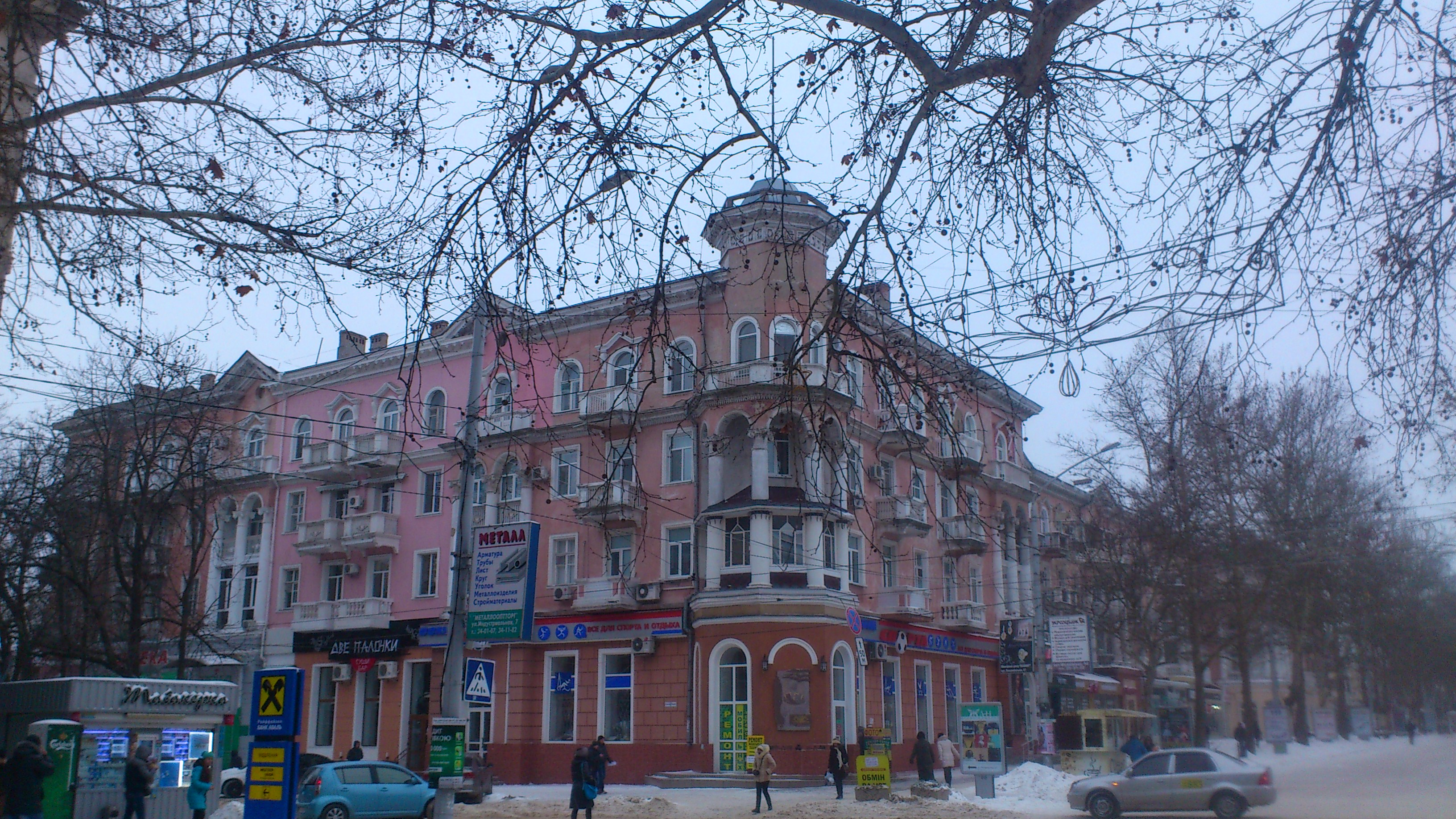 Миколаїв, ріг вулиць Соборна та Потьомкінська